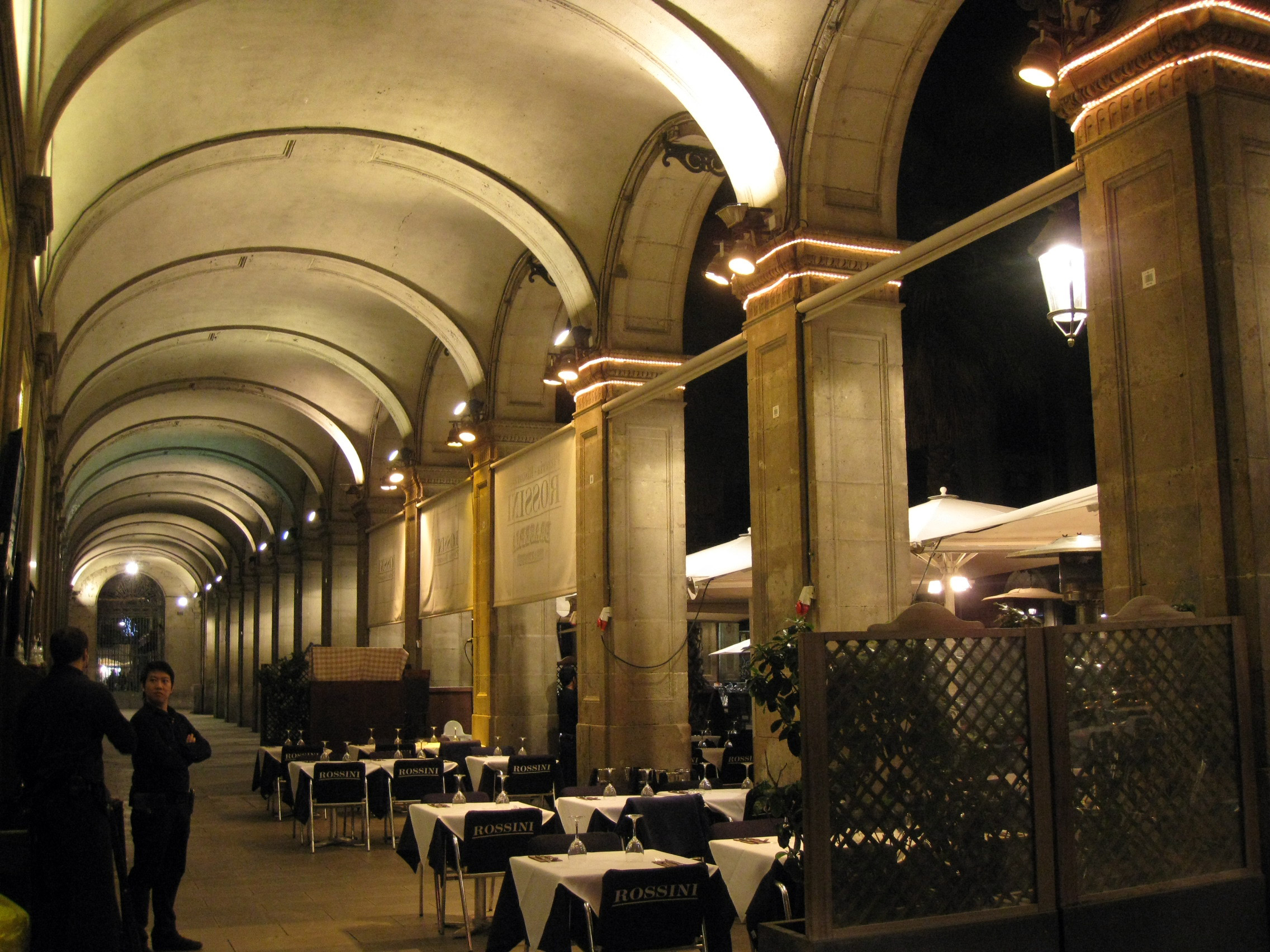 Conjunt de la Plaça Reial (Barcelona)